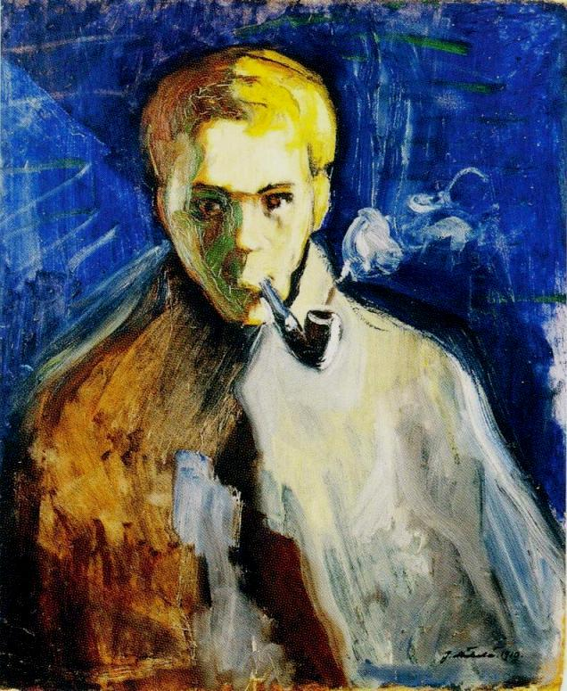 Juho Mäkelän omakuva. Maalaus kuuluu Vaasassa toimivan Pohjanmaan museon omistamaan Hedmanin kokoelmaan.